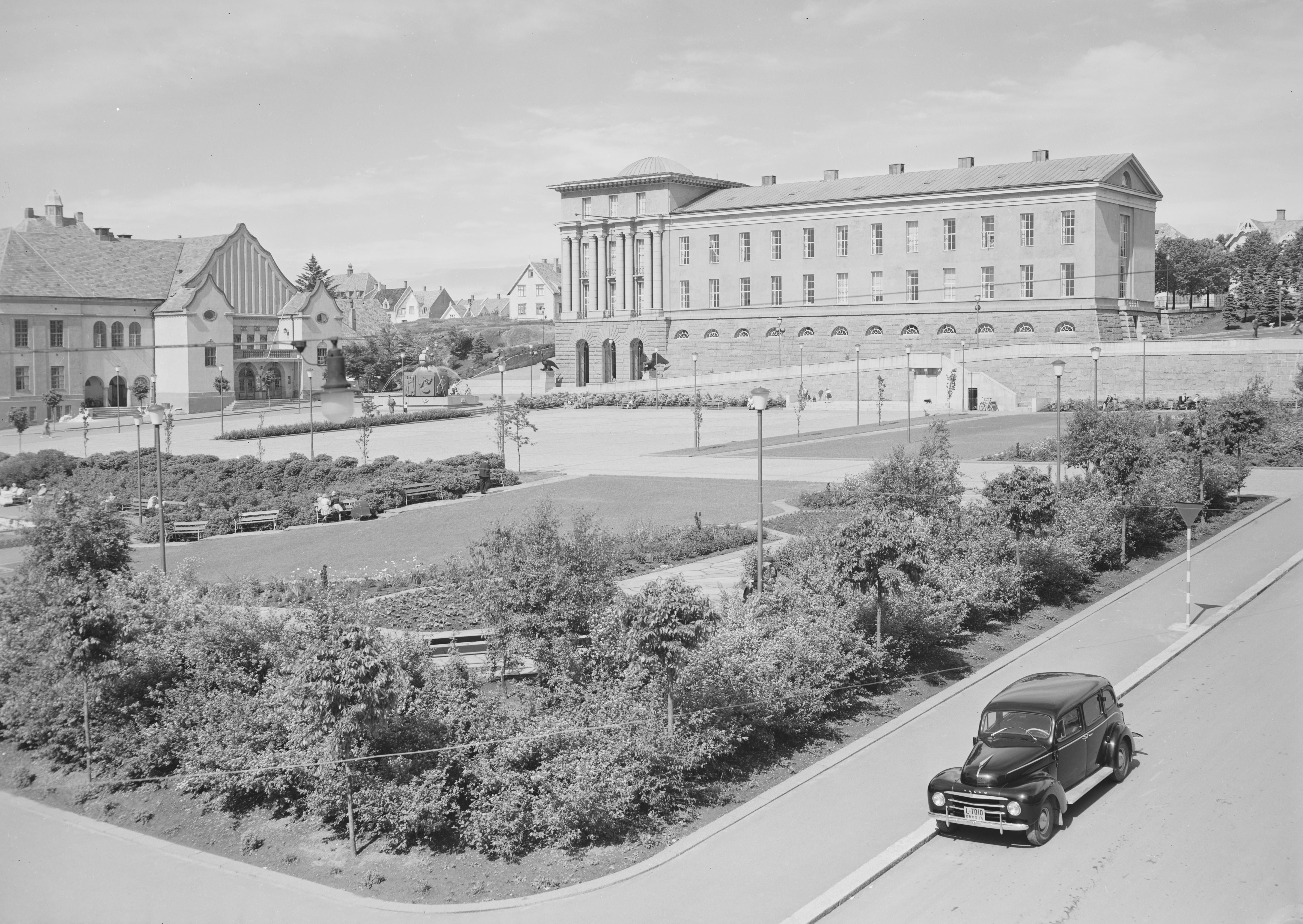 Bildet er hentet fra Nasjonalbibliotekets bildesamling. Anmerkninger til bildet var: Fotograf ukjent. Haugesund, Haugesund, Rogaland